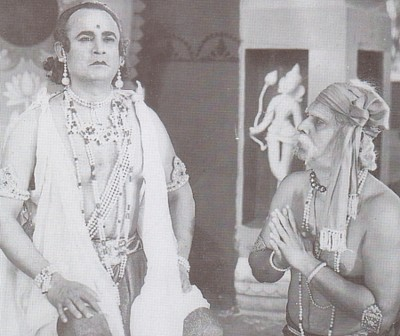 A scene from Seeta (Dir: Sisir Bhaduri), 1933. Sisir Bhaduri, Amalendu Lahiri.